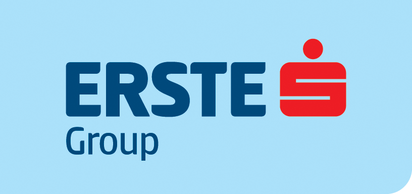 Logo Erste Group